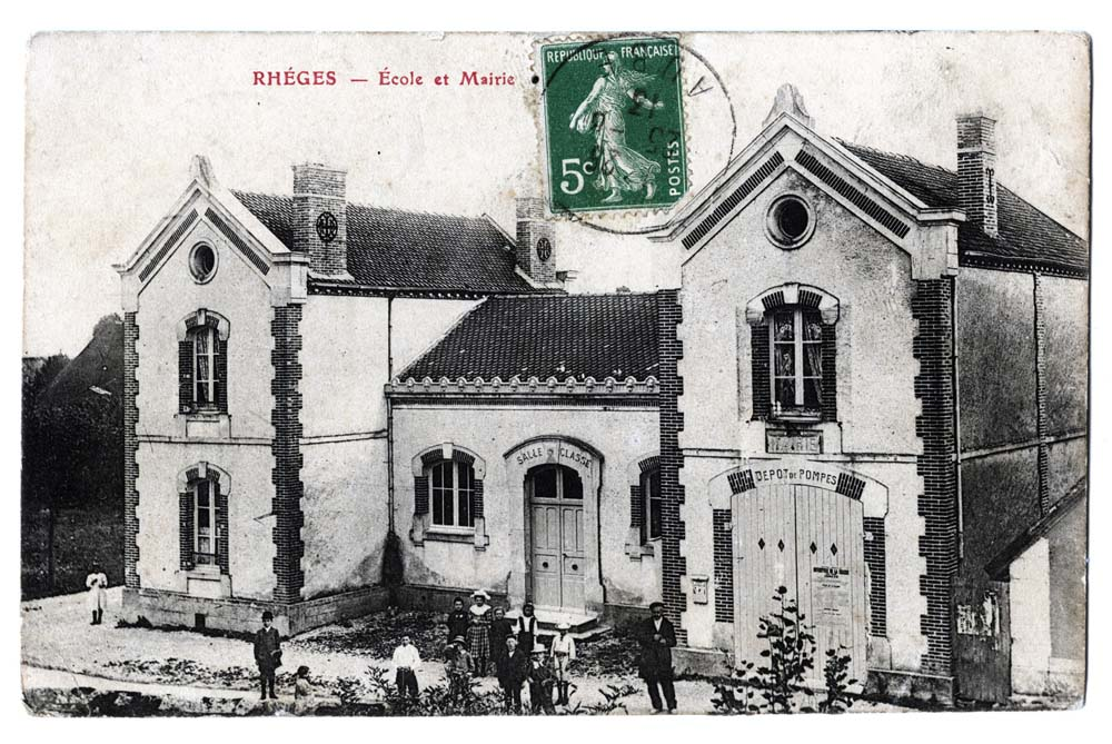 une carte postale